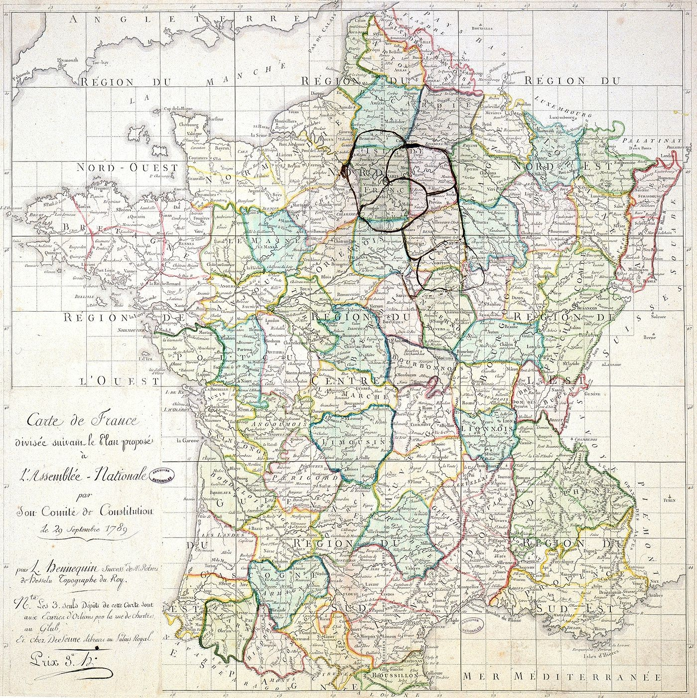 "Carte de France divisée suivant le plan proposé à l’Assemblée nationale", premières propositions de découpage préalables à la division de la France en départements